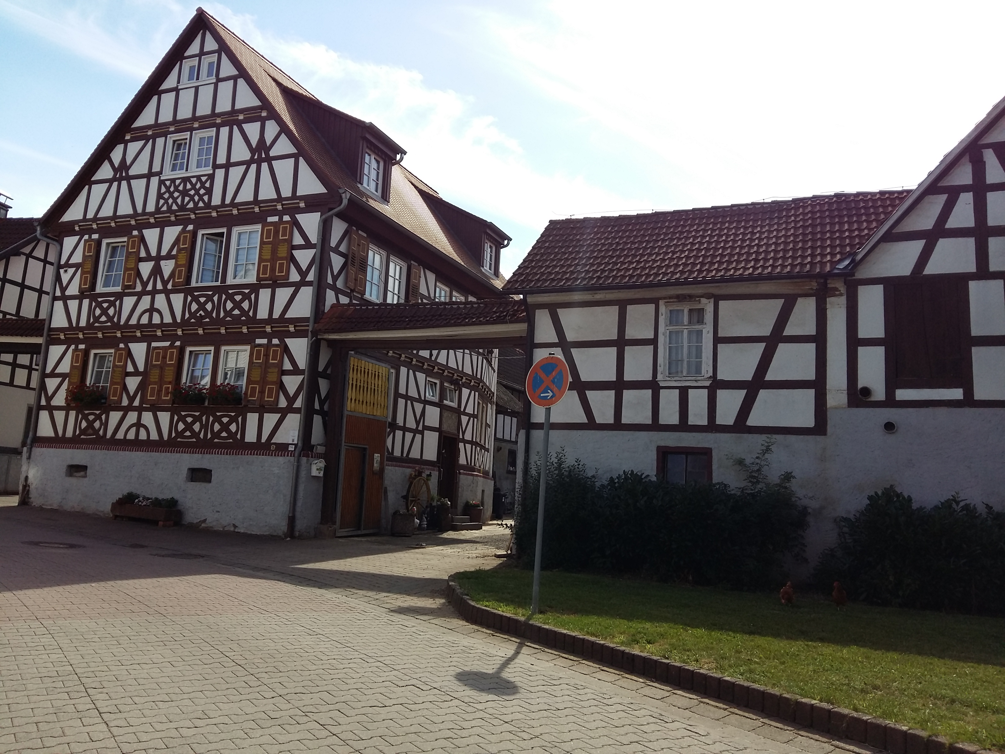 Haus in der Eckstraße 5 in Groß-Bieberau - Rodau